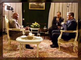 عبداله واد